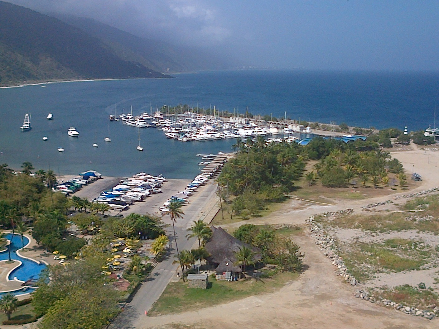 Naiguata, Municipio Vargas, Estado La Guaira, Venezuela